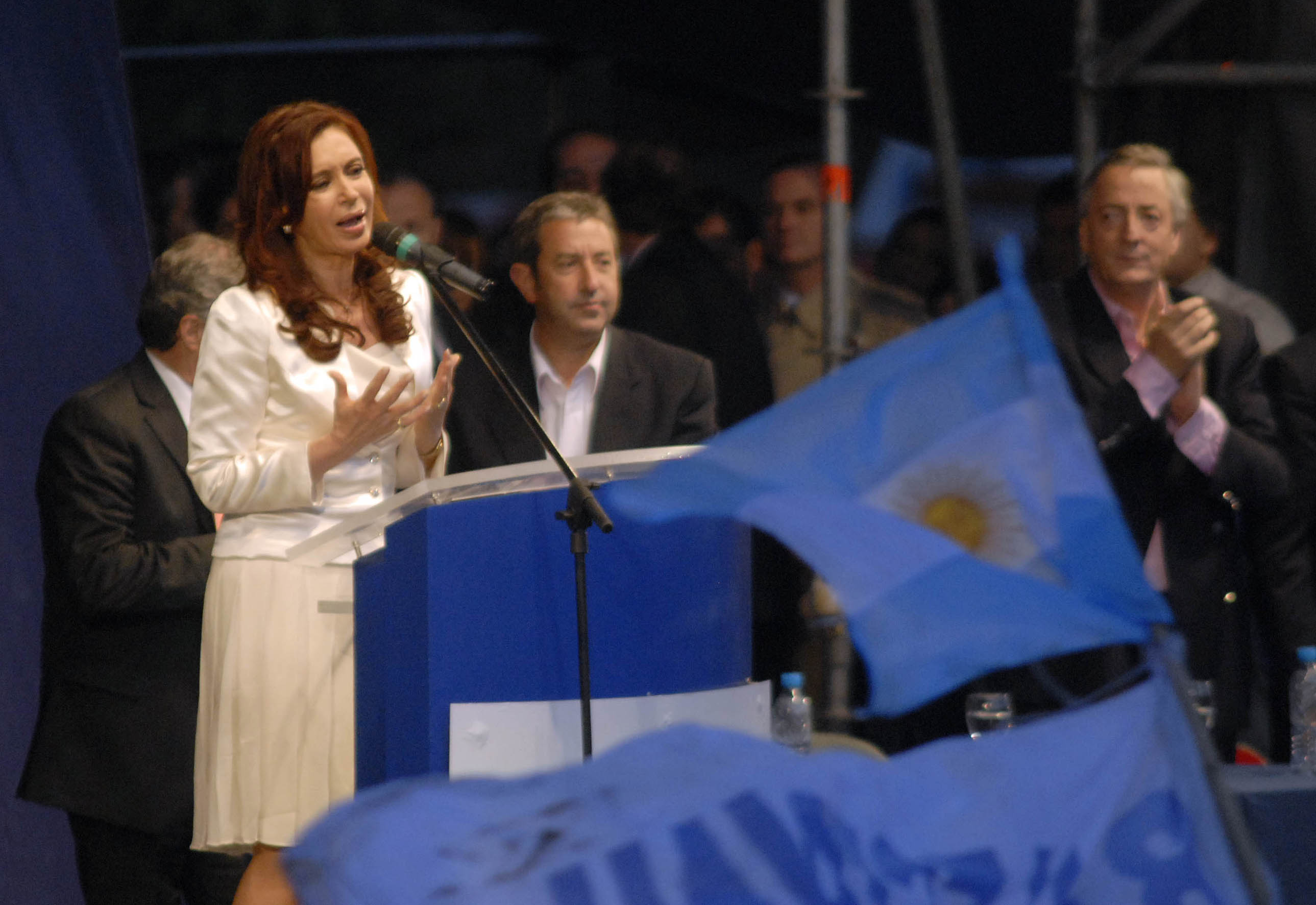 Elecciones de 2007 en Argentina, Cristina e Néstor Kirchner.